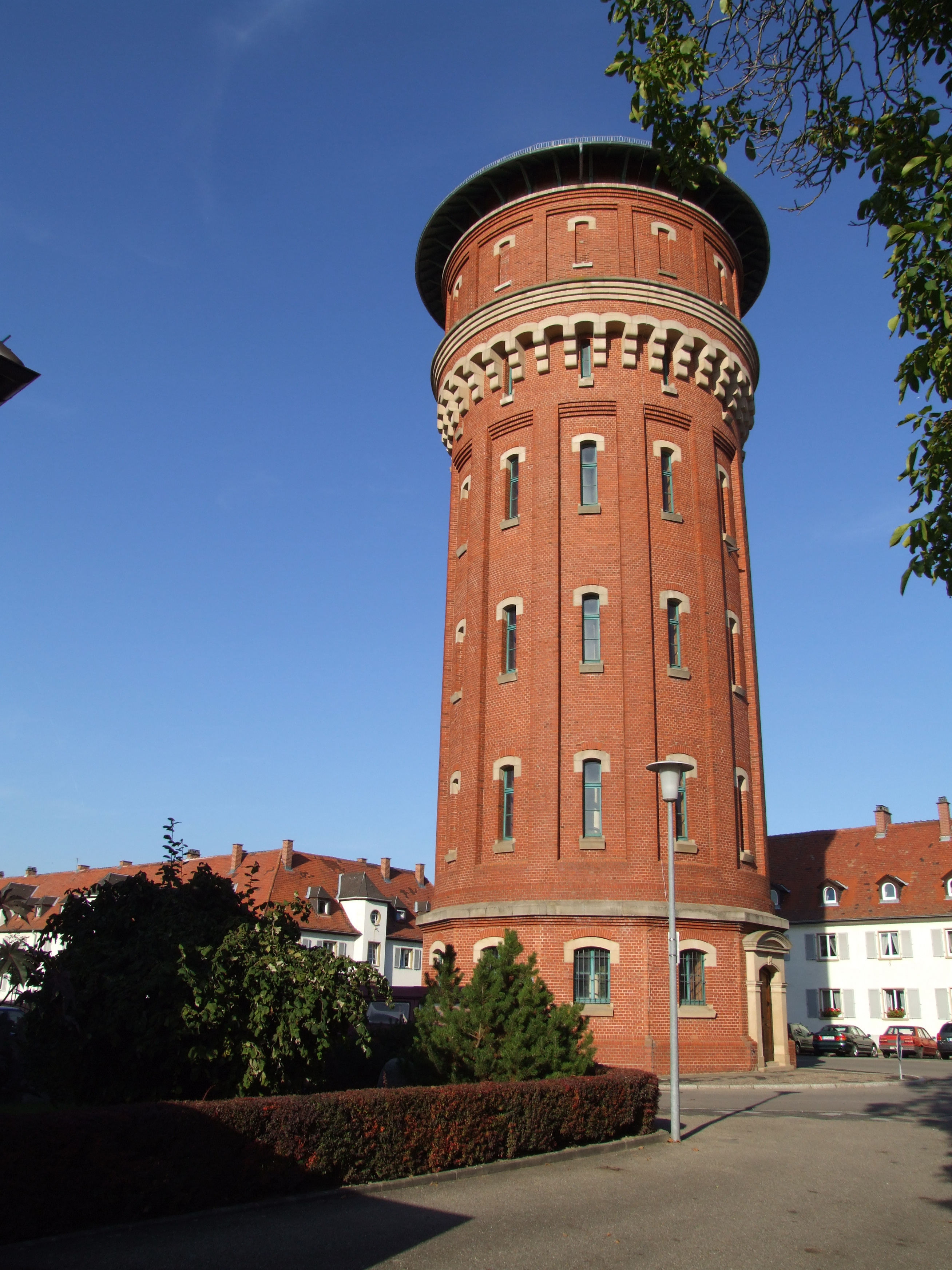 Wasserturm Speyer von Westen